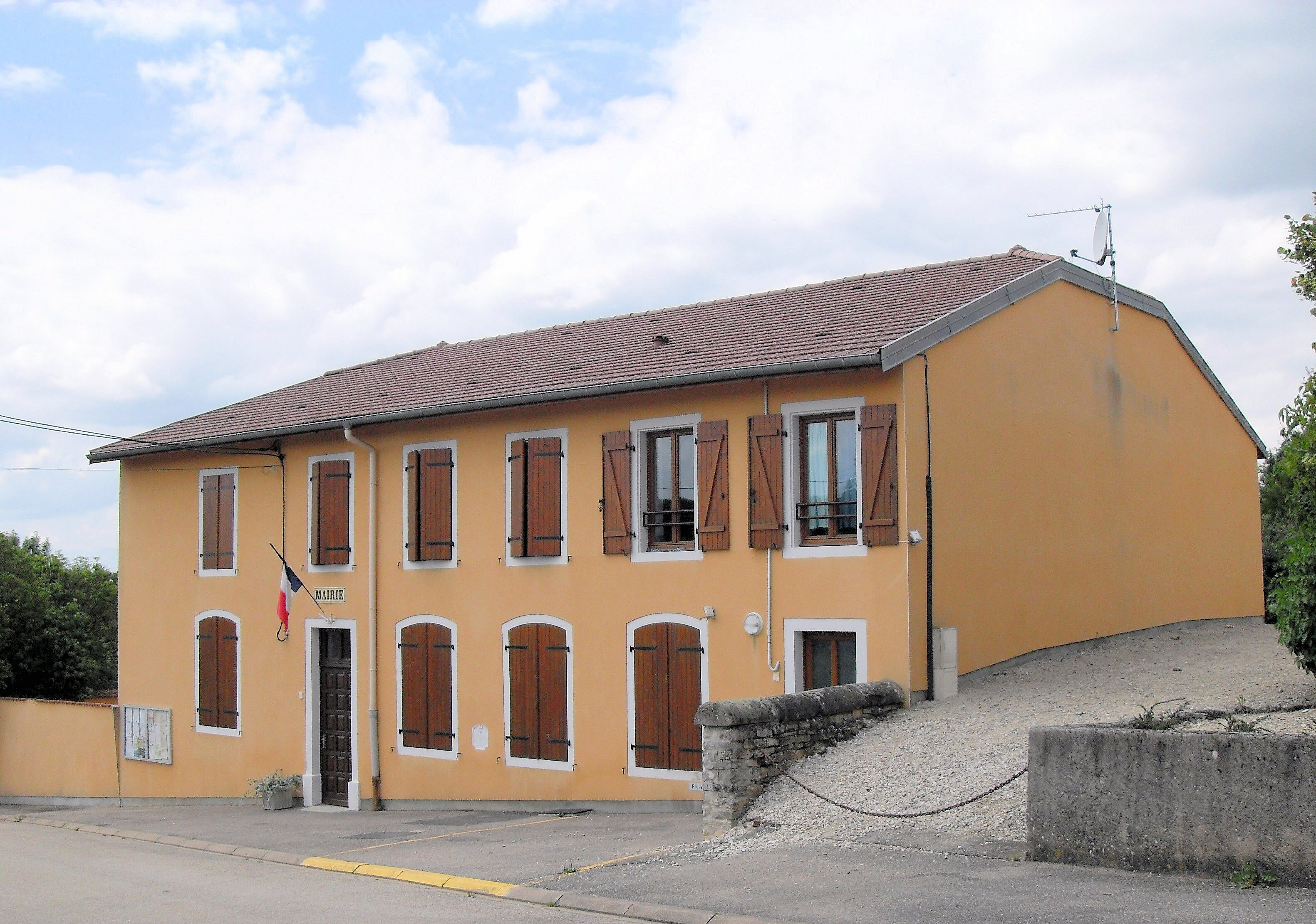 La mairie d'Ahéville